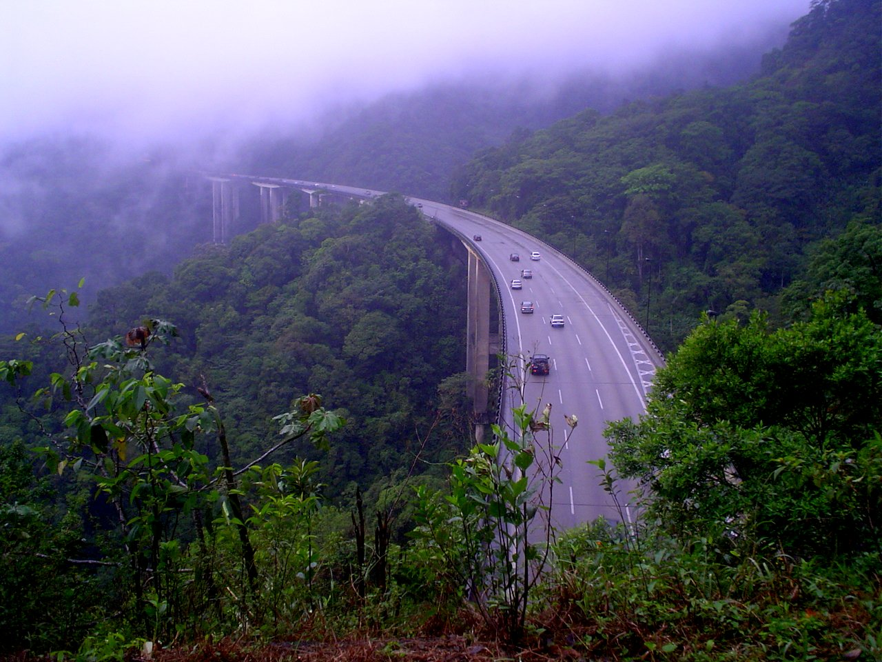 Estrada de Manutenção do DERSA, entre a Rodovia Anchieta e a Imigrantes, conhecida como Manú, no Núcleo Itutinga Pilões, do Parque Estadual da Serra do Mar; òtimo para o cicloturismo.